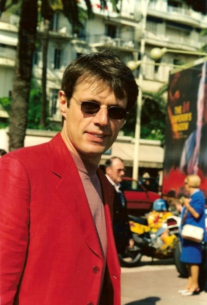 Lambert Wilson au festival de Cannes